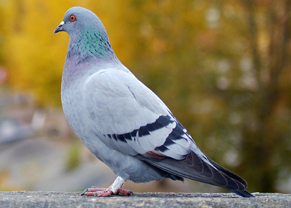 Stadttaube feral pigeon/ city dove (Columba livia forma domestica)